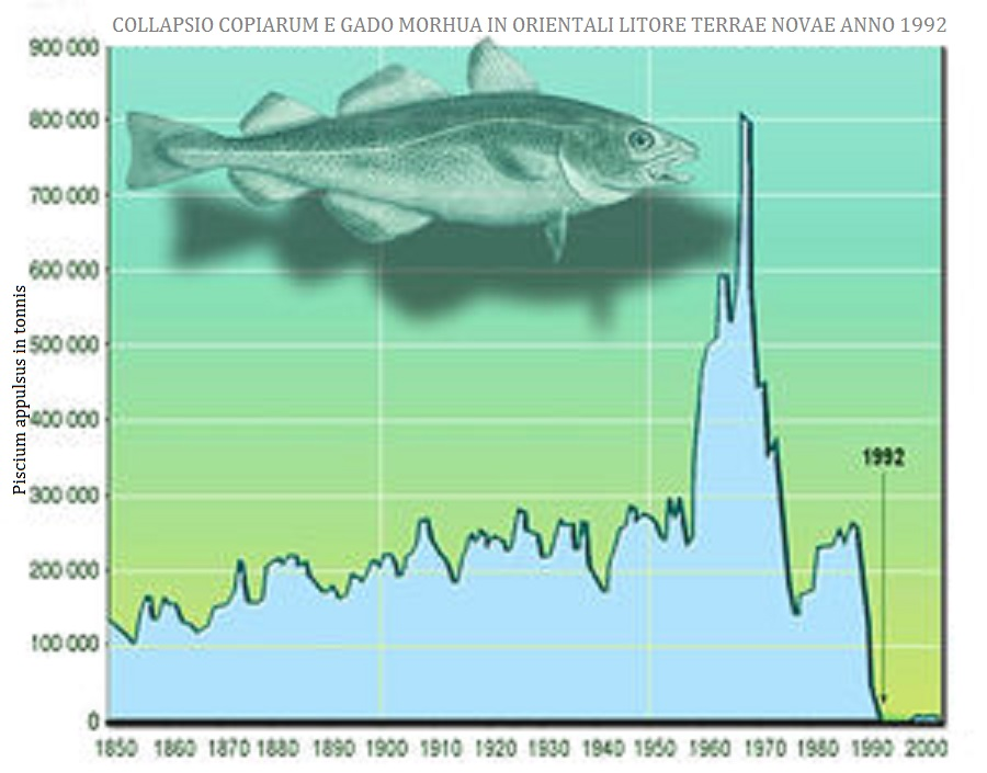 Collapsio gadorum anno 1992